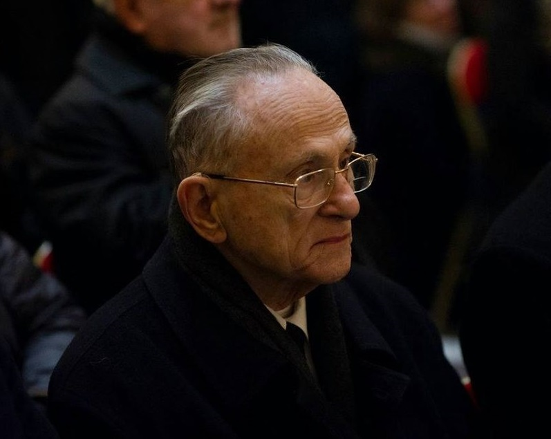 Dimanche 20 janvier 2019 - Le baron Hervé Pinoteau à la Chapelle Expiatoire lors de la messe pour Louis XVI et les autres martyrs de la Révolutions.